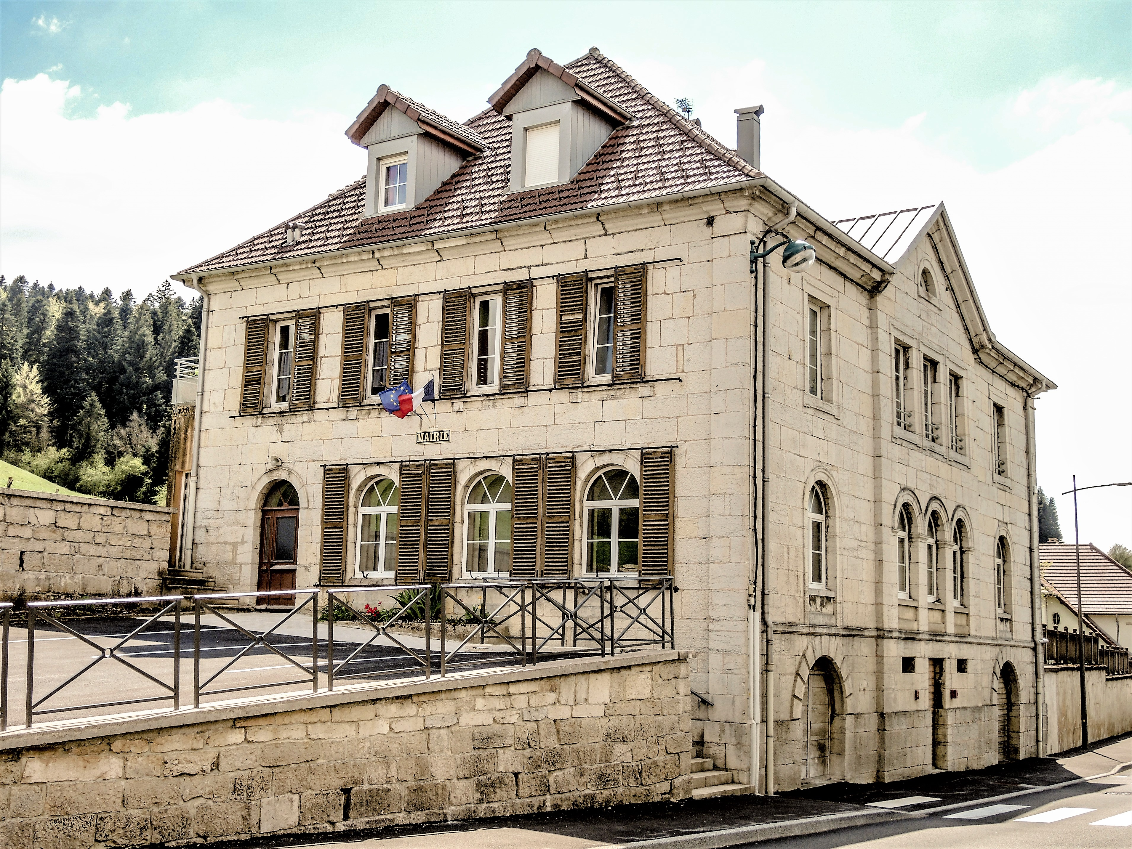 Mairie